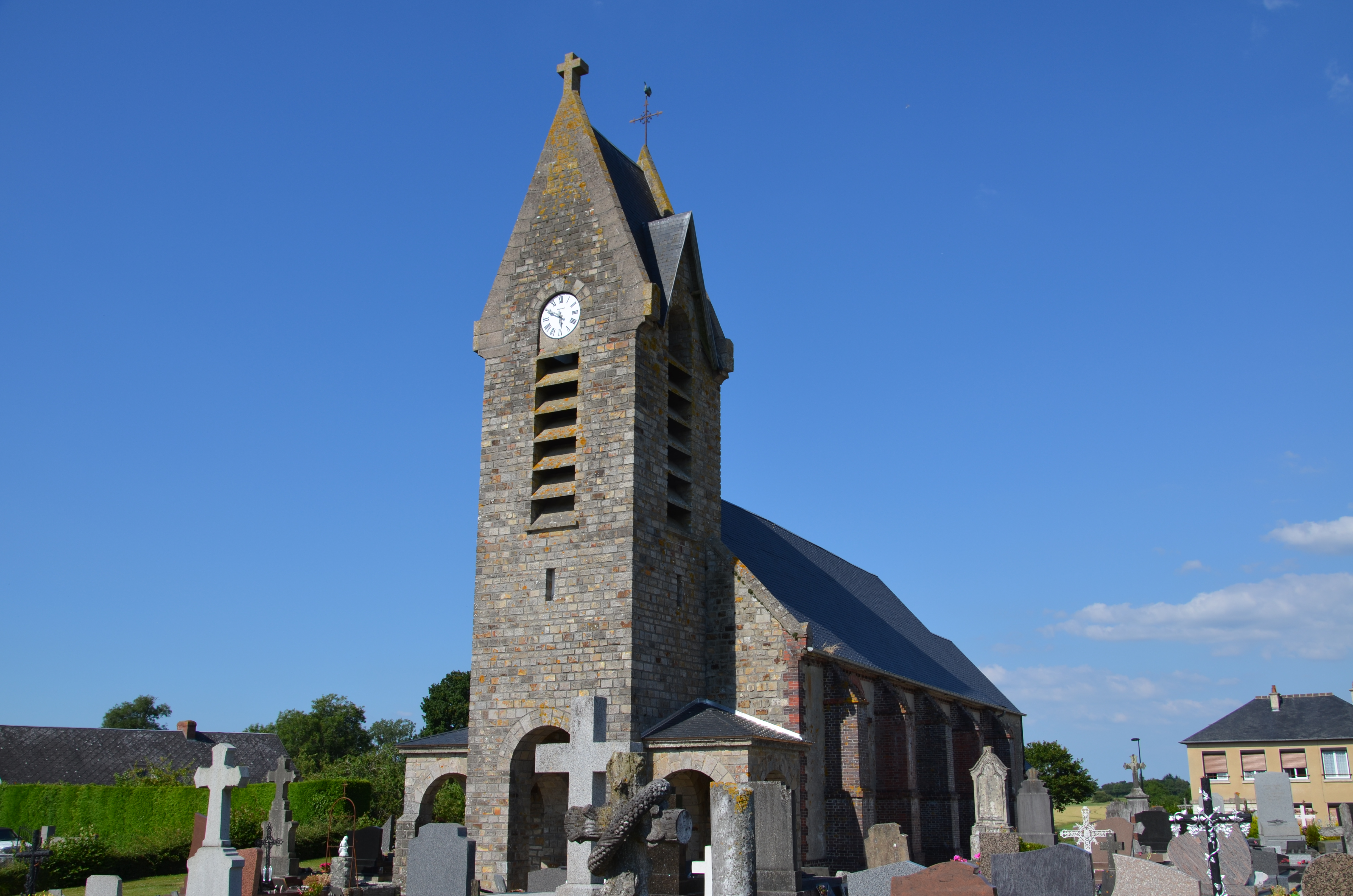 Église Saint-Jean de Saint-Jean-des-Essartiers.